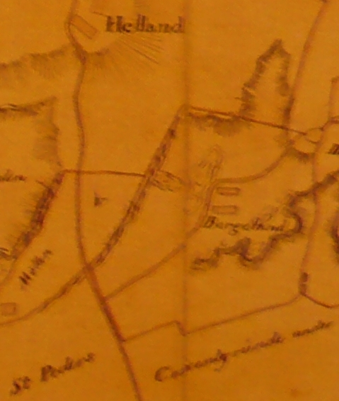 Kartutsnitt fra 1843 som viser husmannsplassen Bergeland i Stavanger.